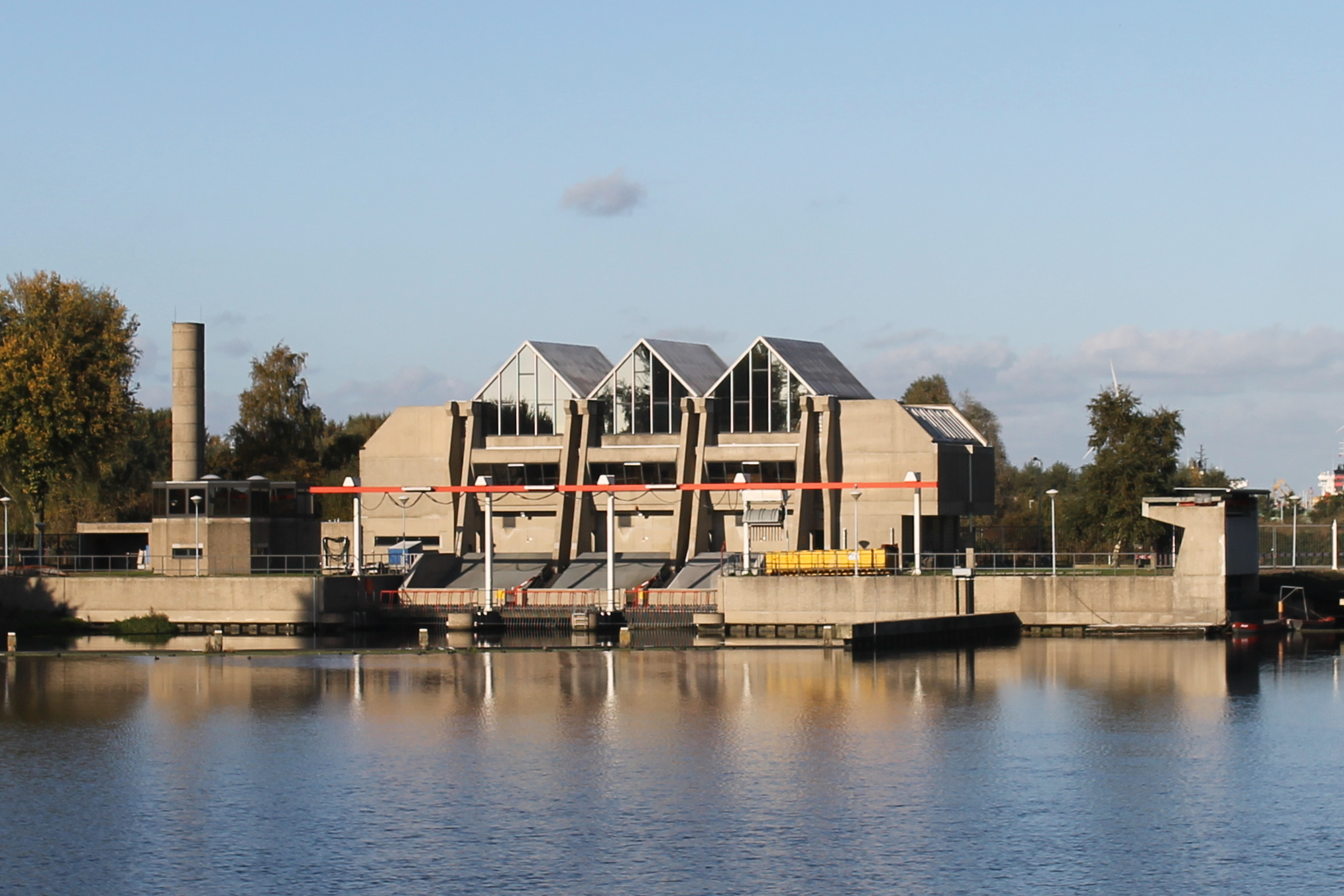 Boezemgemaal Halfweg, gezien vanuit het zuiden.